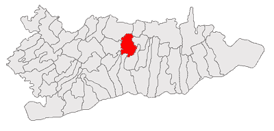 Categorie:Hărţi ale judeţului Călăraşi